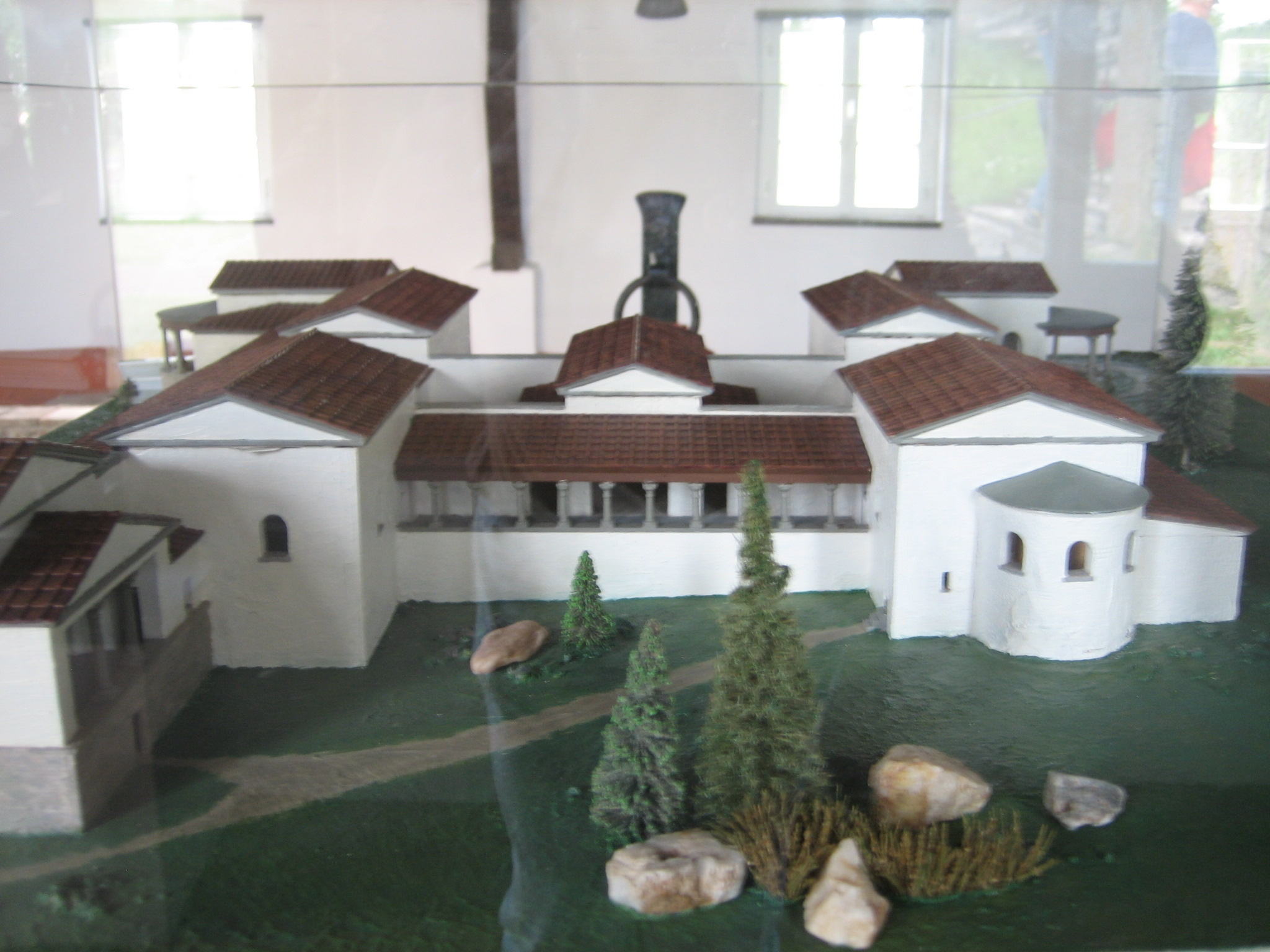 Eng Maquette vun der Villa Otrang, bei Bitburg